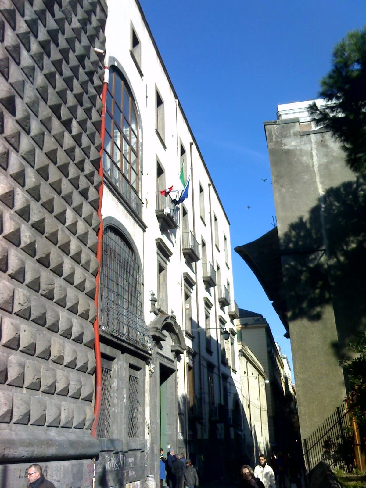 Istituto Fonseca di Napoli